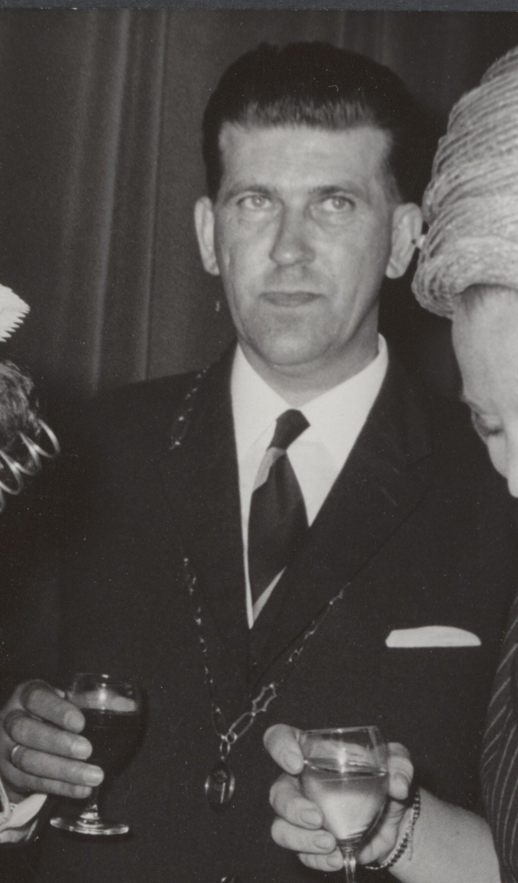 Collectie / Archief : Fotocollectie Elsevier Reportage / Serie : [ onbekend ] Beschrijving : koninklijk huis, prinsessen, jeugd, klederdrachten, burgemeesters, dranken, Beatrix, prinses, Hack A., Zilveren Schor Het Datum : 22 april 1965 Locatie : Arnemuiden Trefwoorden : burgemeesters, dranken, jeugd, klederdrachten, koninklijk huis, prinsessen Persoonsnaam : Beatrix, prinses, Hack A., Zilveren Schor Het Fotograaf : Nijs, Jac. de / Anefo Auteursrechthebbende : Nationaal Archief Materiaalsoort : Foto (zwart/wit) Nummer archiefinventaris : bekijk toegang 2.24.05.02 Bestanddeelnummer : 017-0694